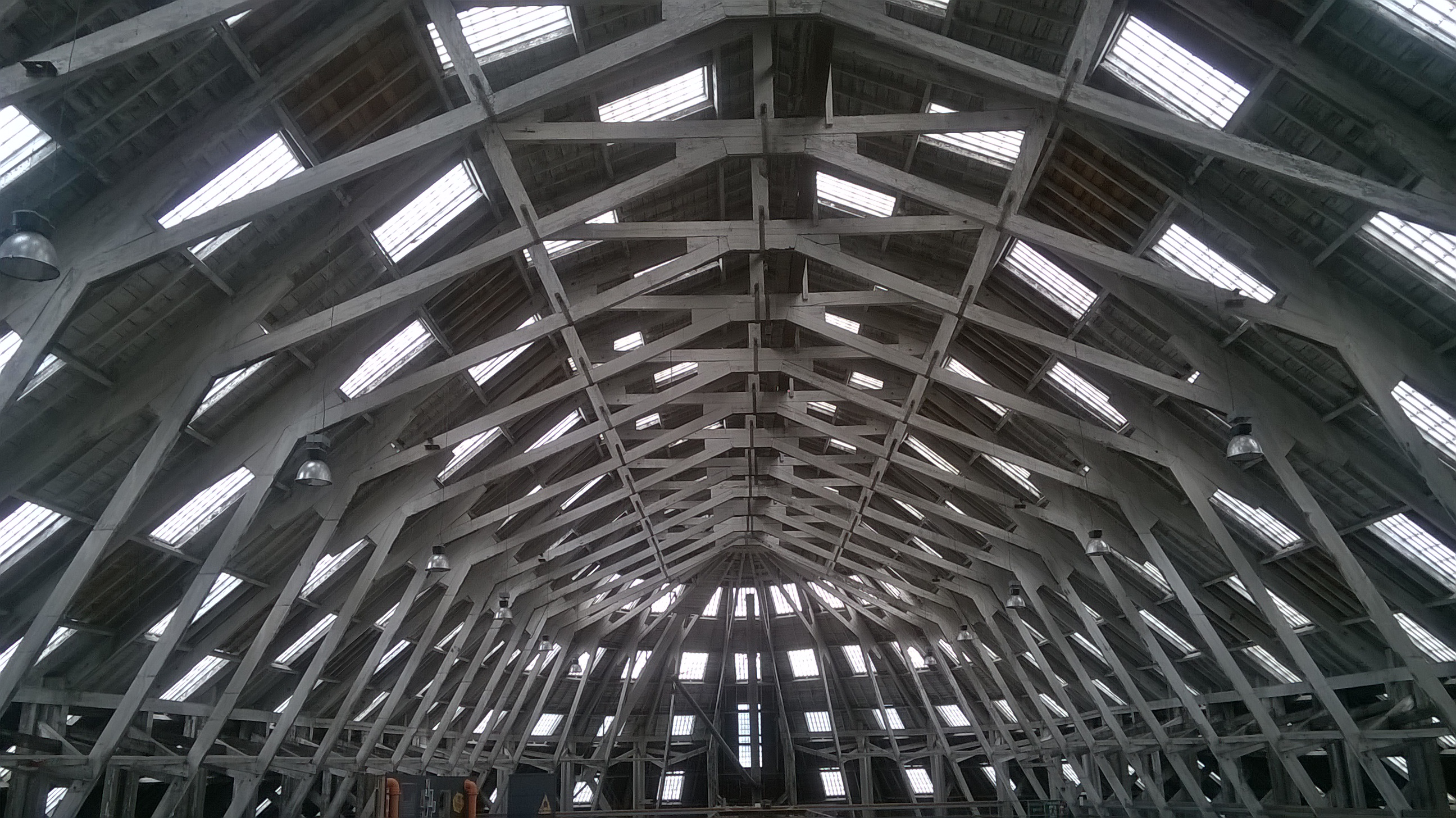 Dachkonstruktion der viktorianischen Werfthalle von Chatham Historic Dockyard